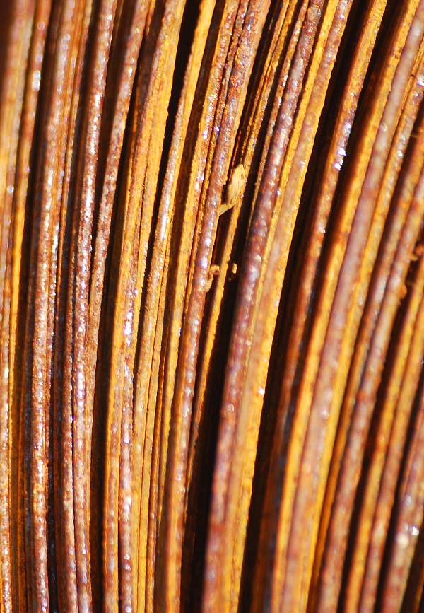 Detail rezavého drátu